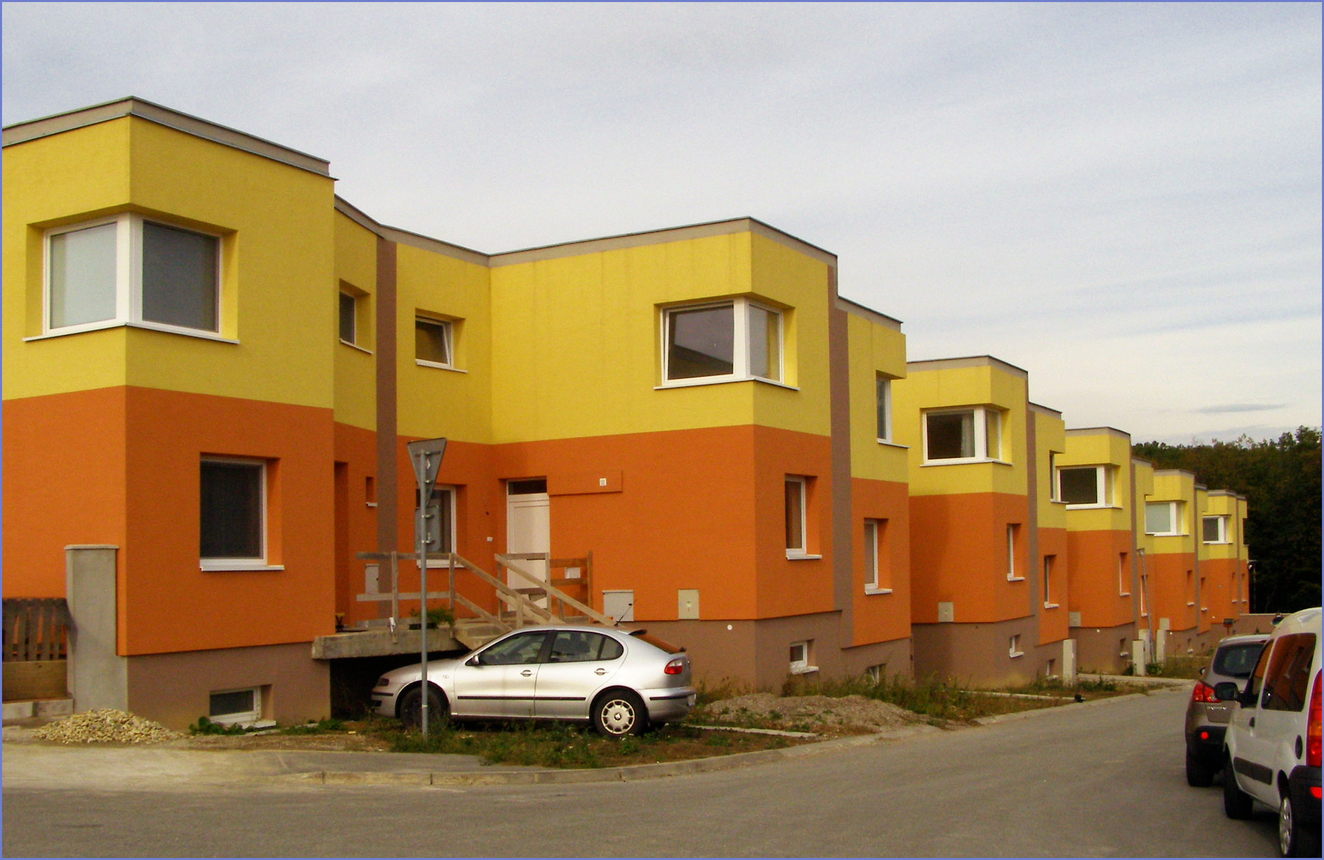 Nová výstavba